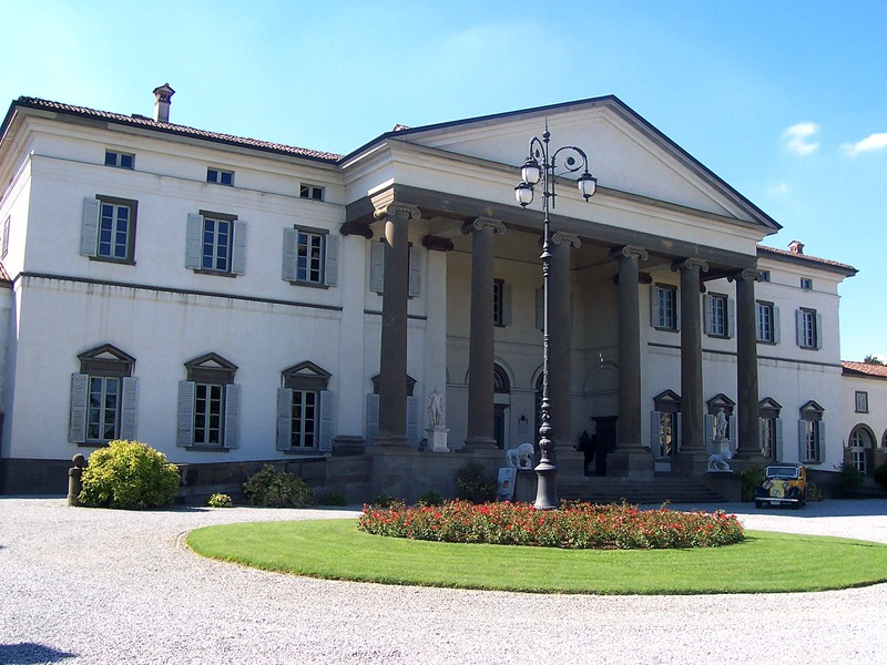 Stezzano - Villa Caroli Zanchi